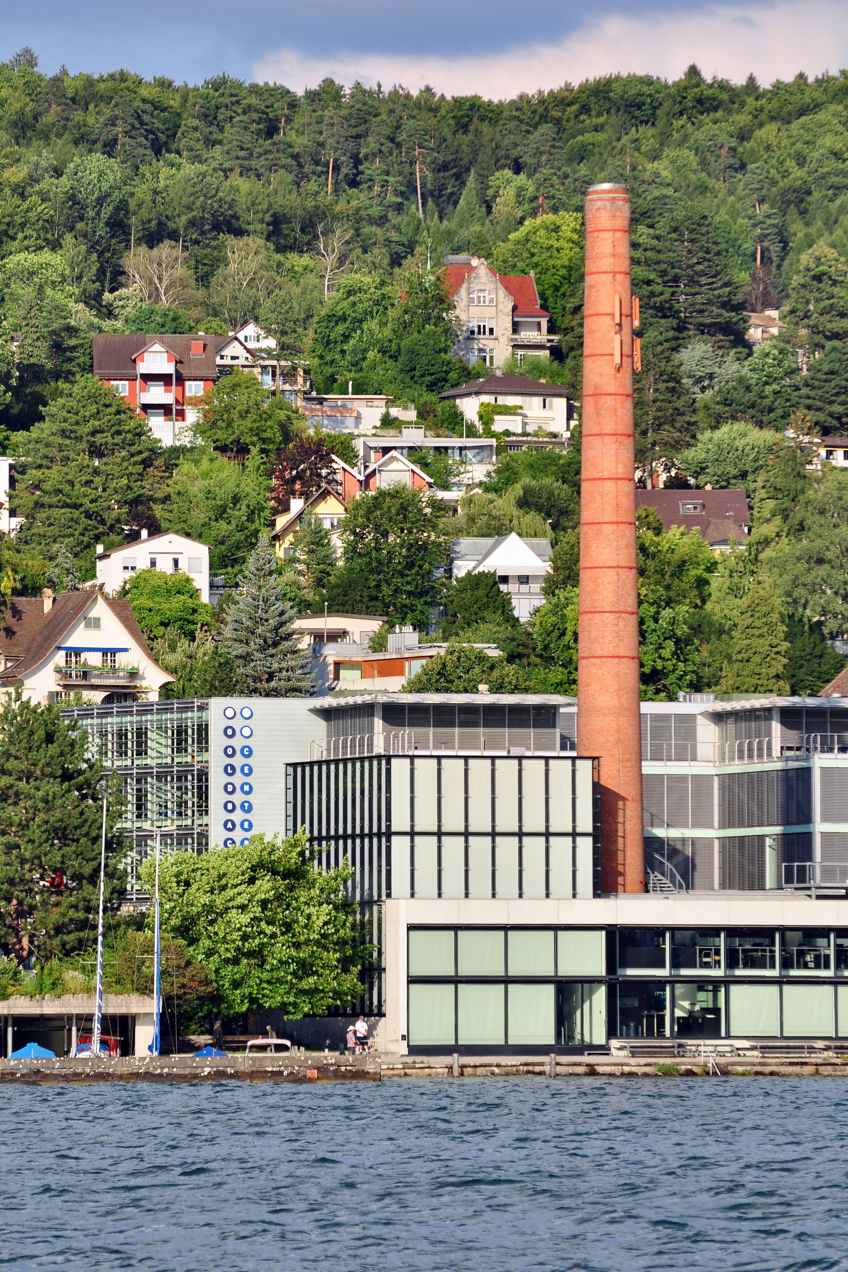 Terlinden in Küsnacht (Switzerland) as seen from ZSG motorship Wädenswil